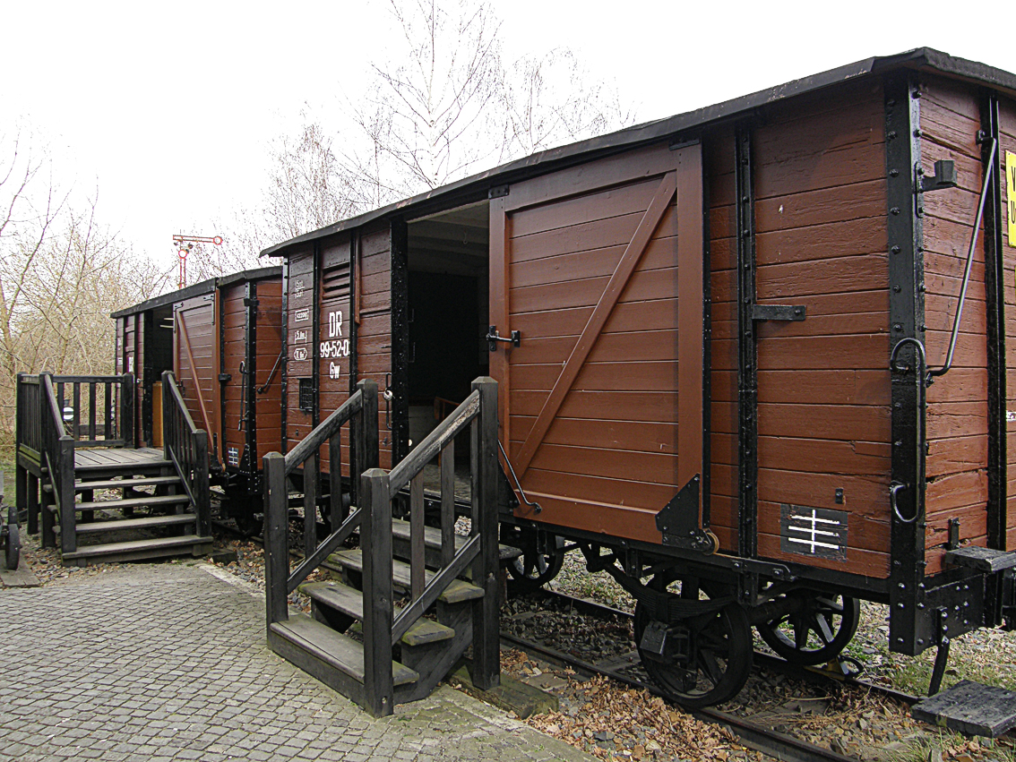 Zwei alte Waggons